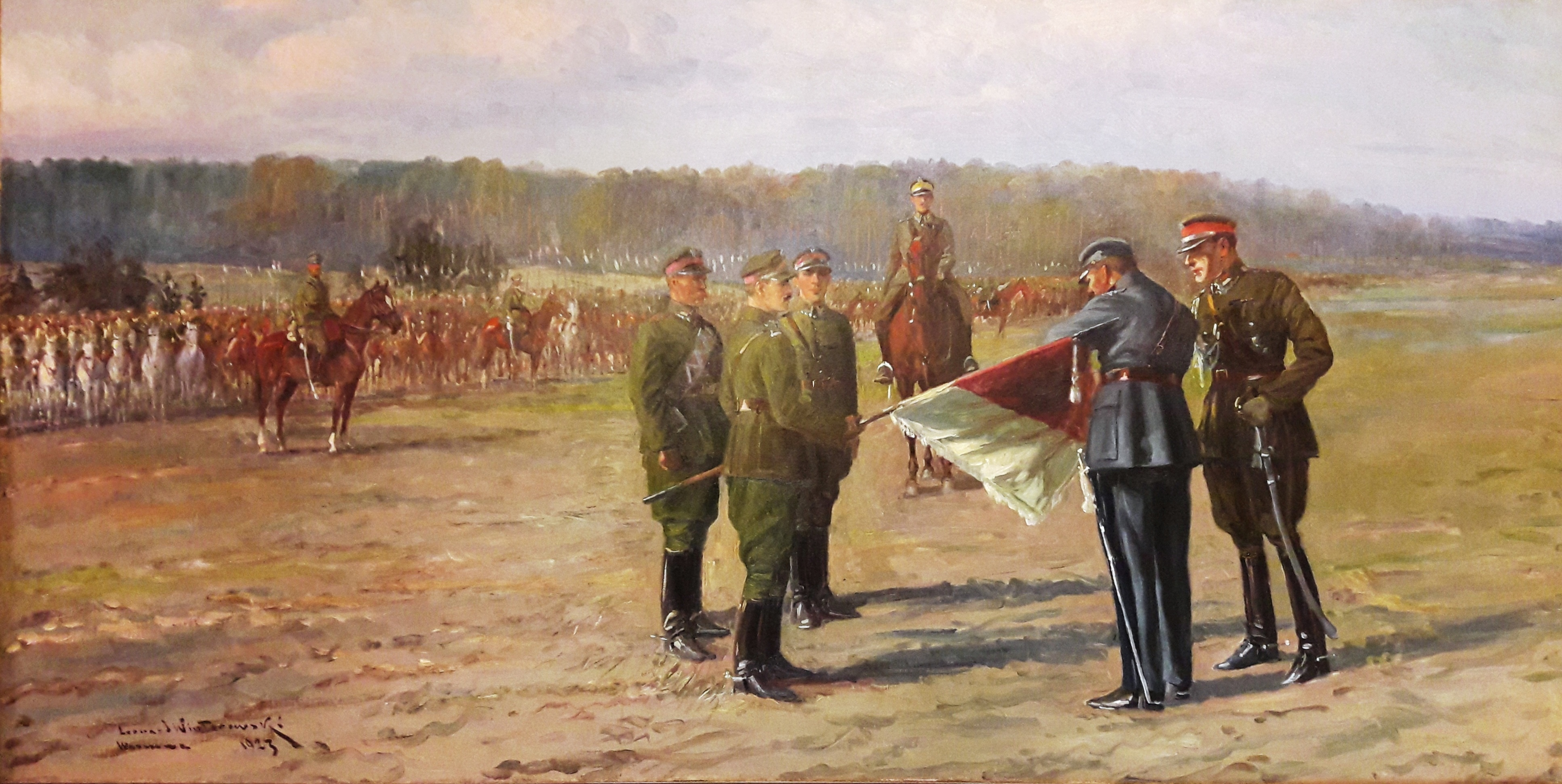 Marszałek Józef Piłsudski dekoruje Krzyżem Srebrnym Orderu Virtuti Militari sztandar 1 Pułku Ułanów Krechowieckich, Tomaszów Lubelski, 20 marca 1920 r. Leonard Winterowski,1923 r.